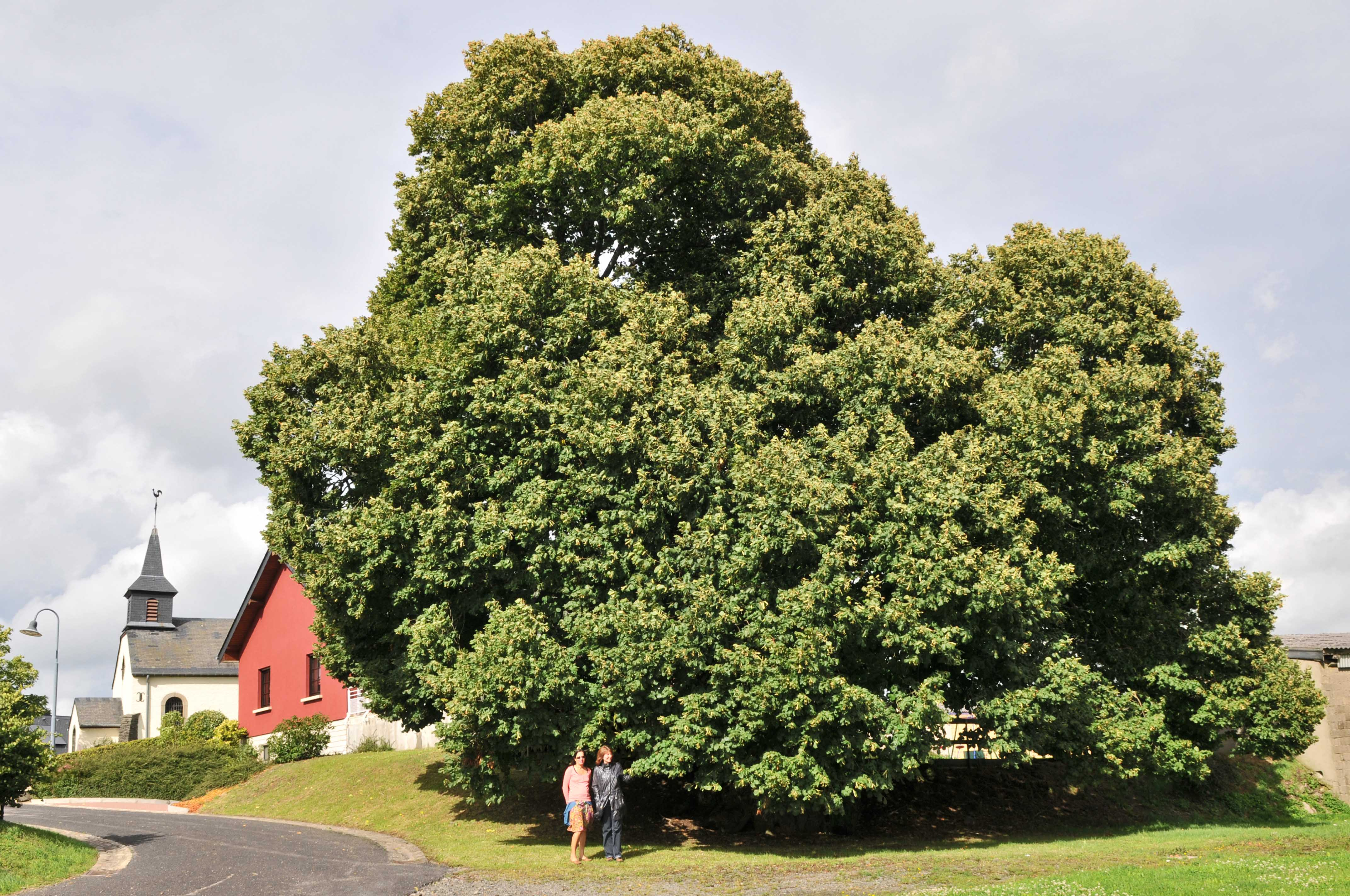 Lann zu Pëtscht.